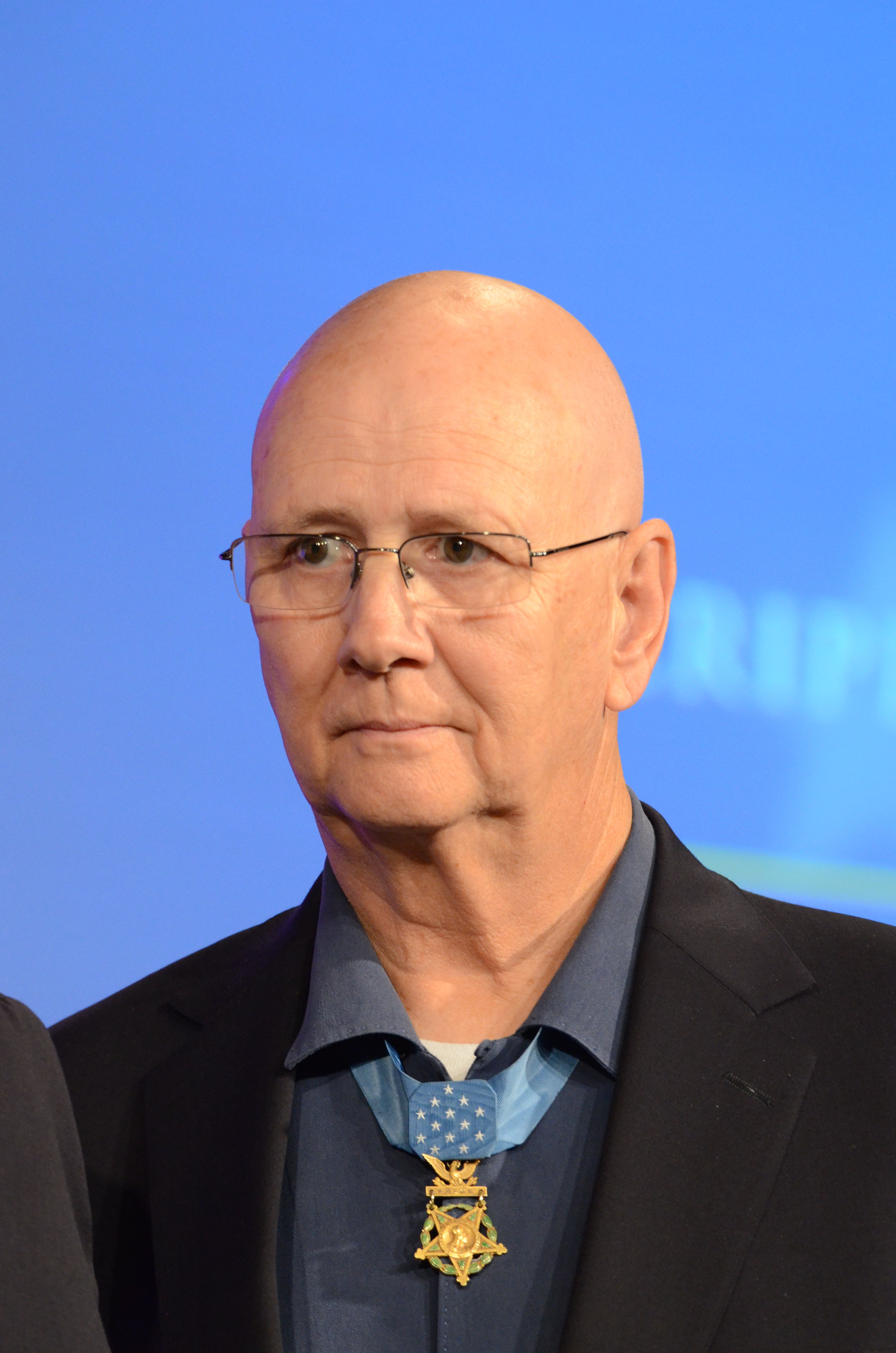 Recipient Allen Lynch.